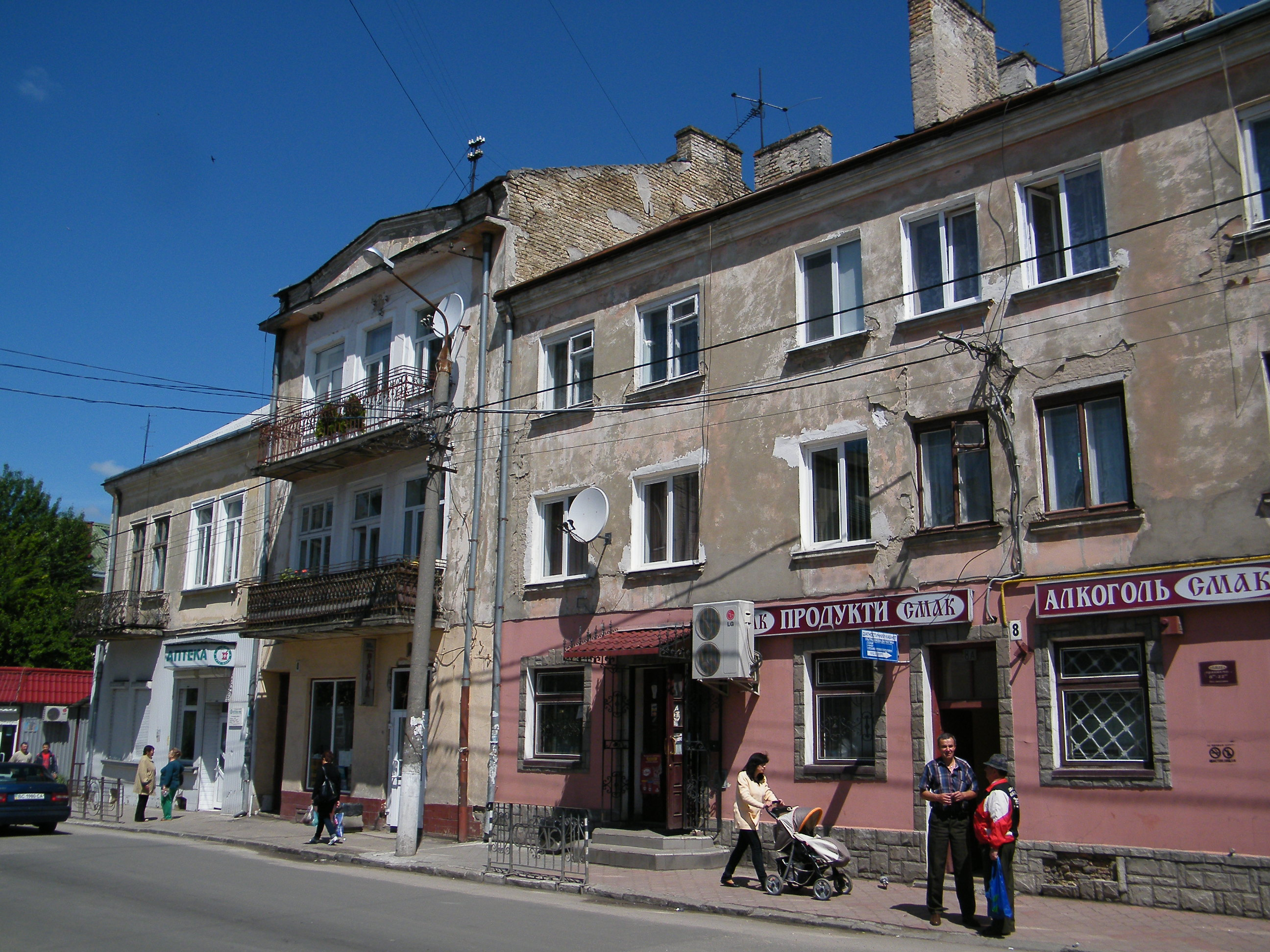 В центре города